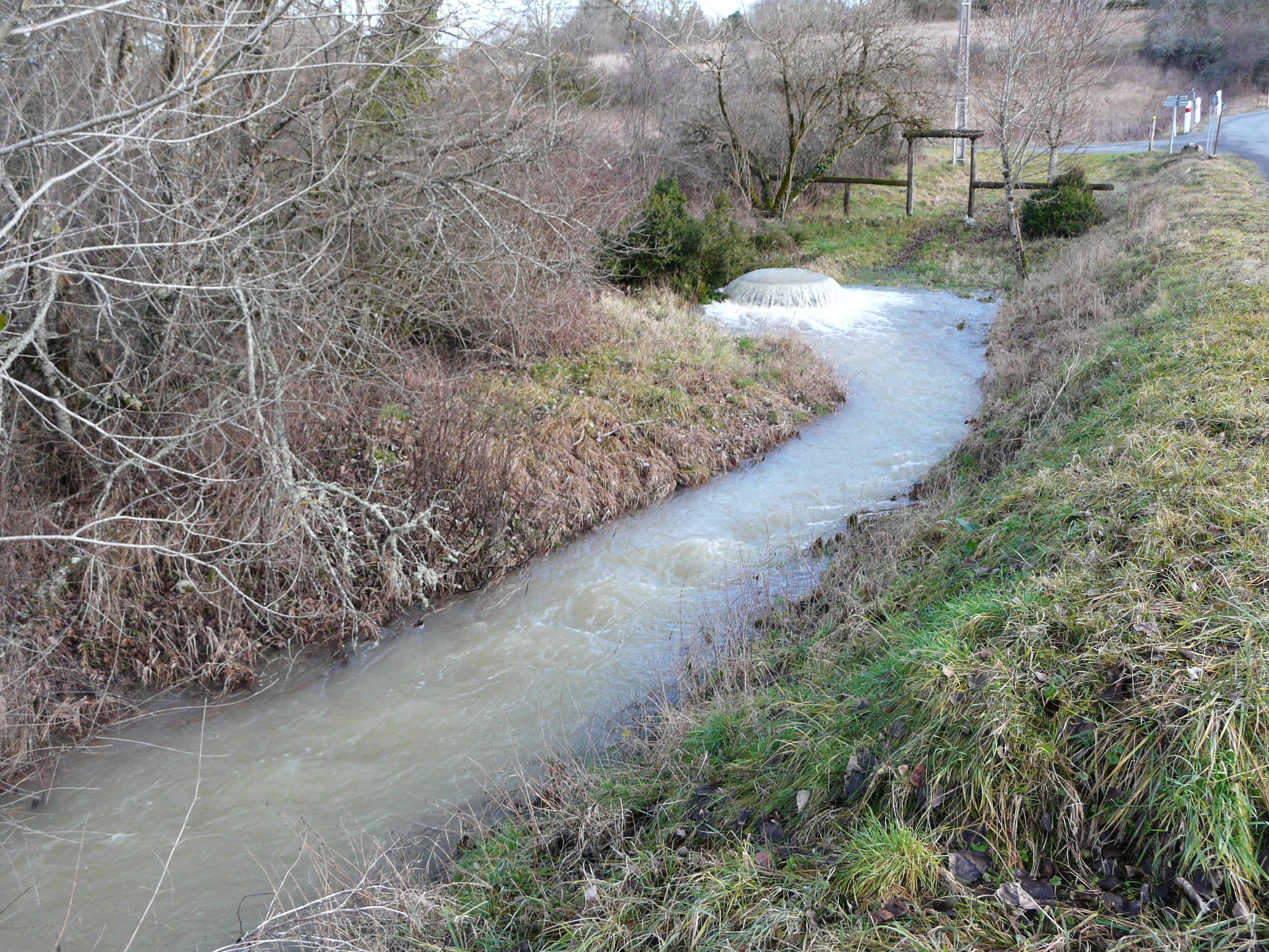 Source artésienne du Blâme (après une période de plusieurs jours de fortes pluies), puits de Bontemps, Brouchaud, Dordogne, France